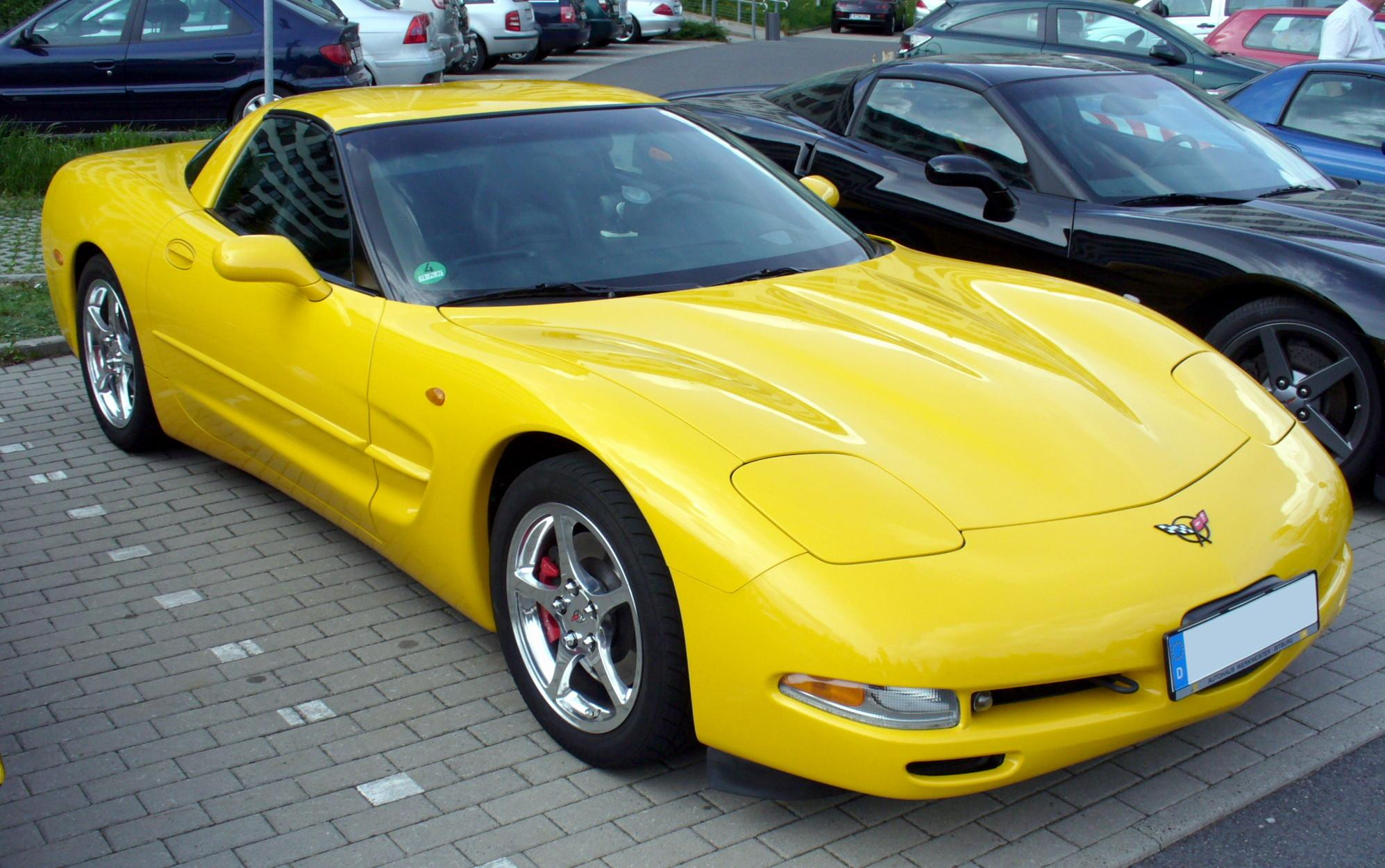 Chevrolet Corvette C5 Coupe Export Model